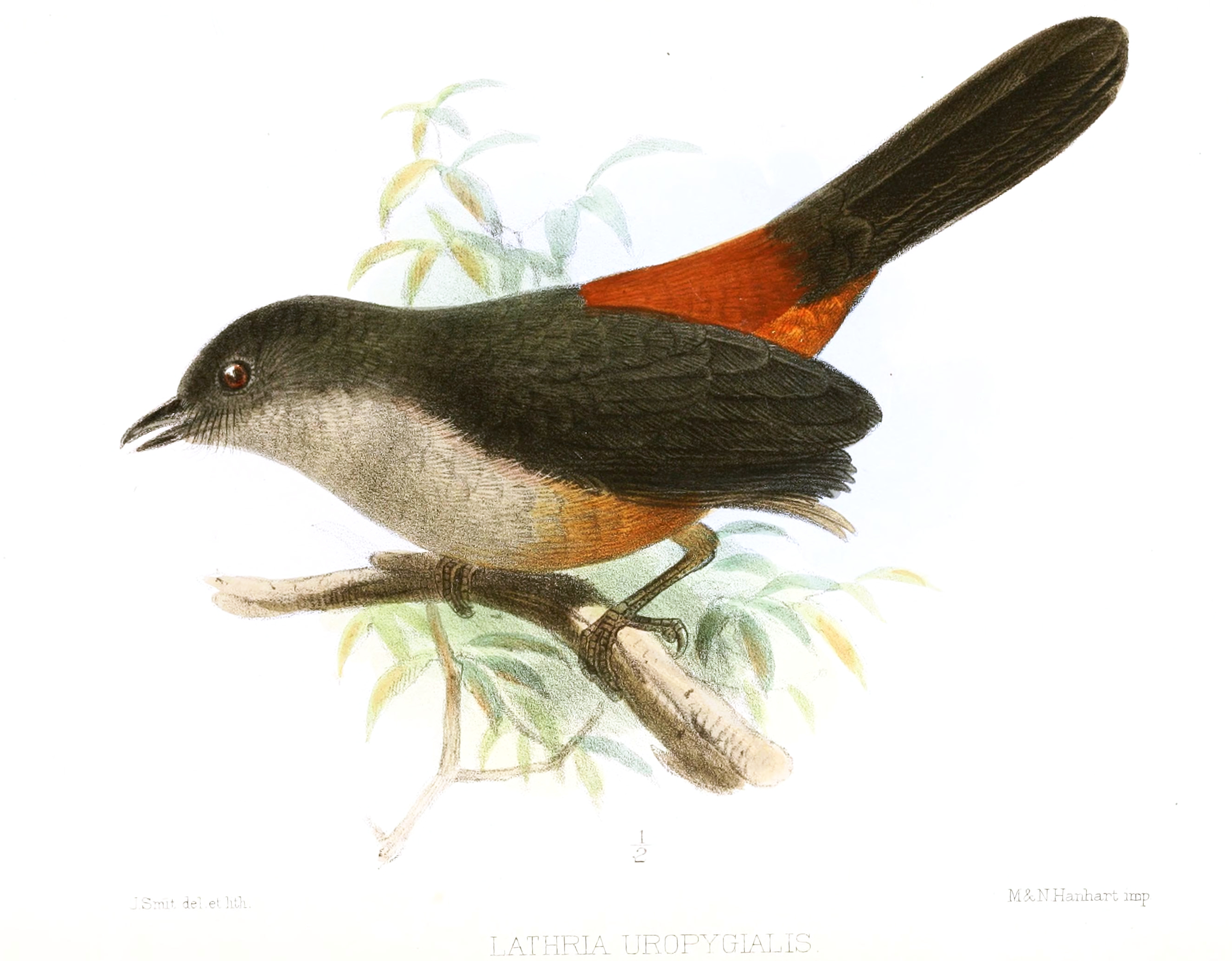 Lathria uropygialis = Lipaugus uropygialis